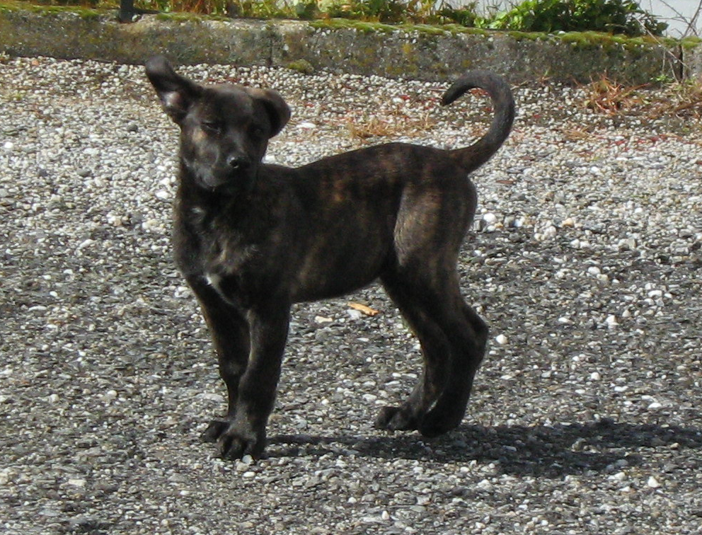 Foto de 'Doshi', um cachorro da raça "Cão de Fila de São Miguel", com 3 meses de idade. O cachorro apresenta orelhas e rabo intactos.